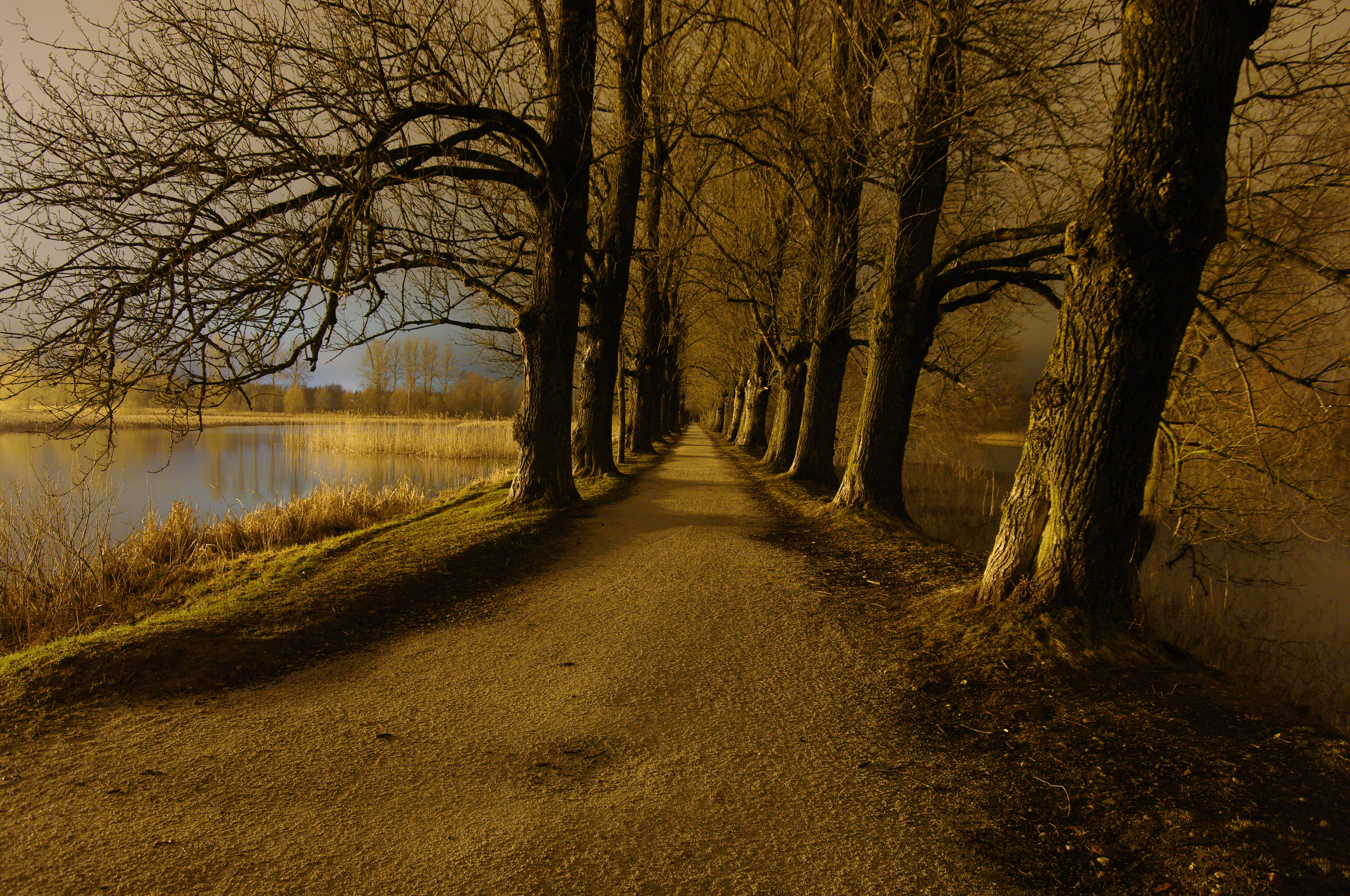 Õine vaade alleele